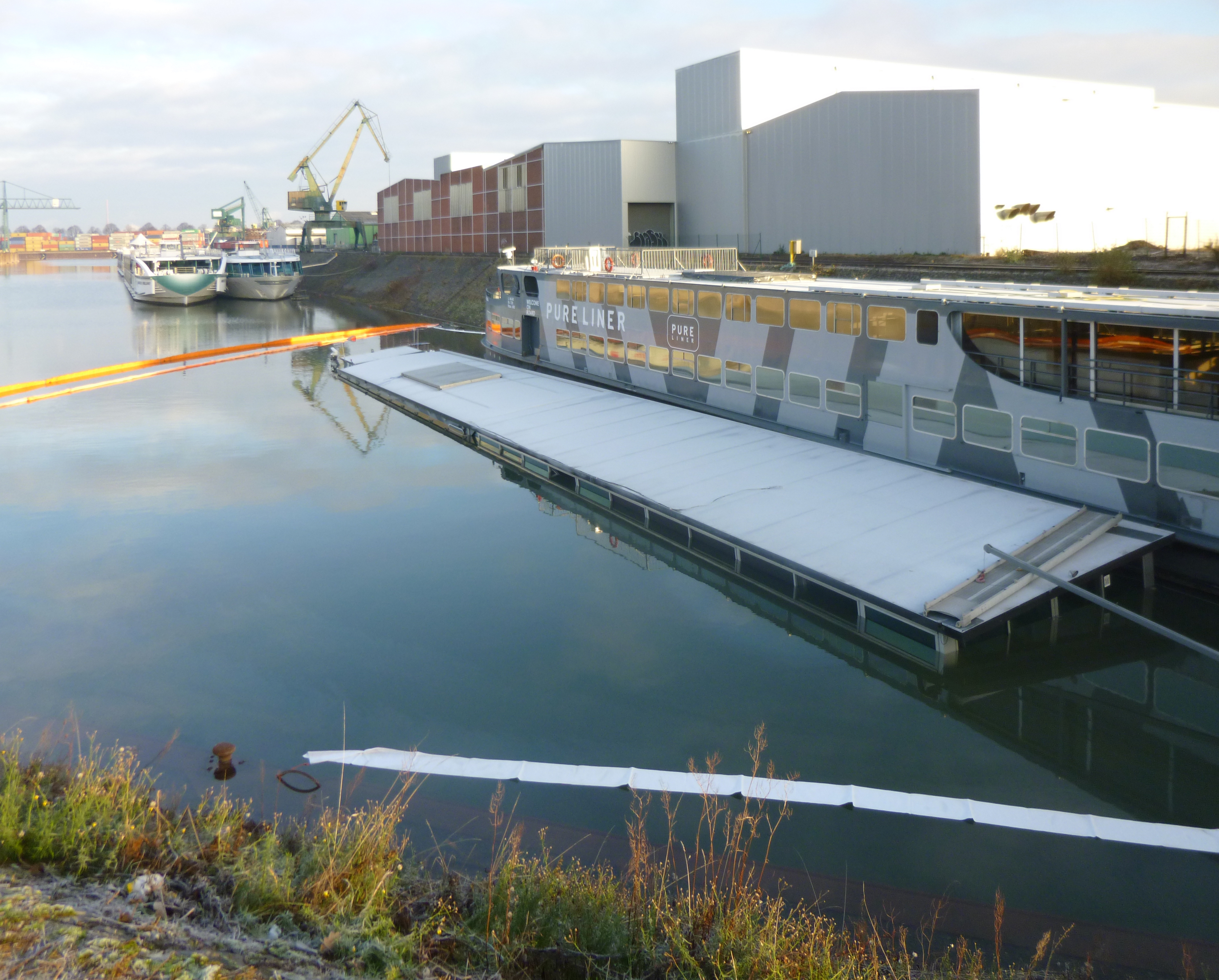 Am 25.12.2018 gesunkenes Schiff Pure-Liner 2 im Becken 3 des Hafens Köln-Niehl I; rechts das Schwesterschiff Pure-Liner 1